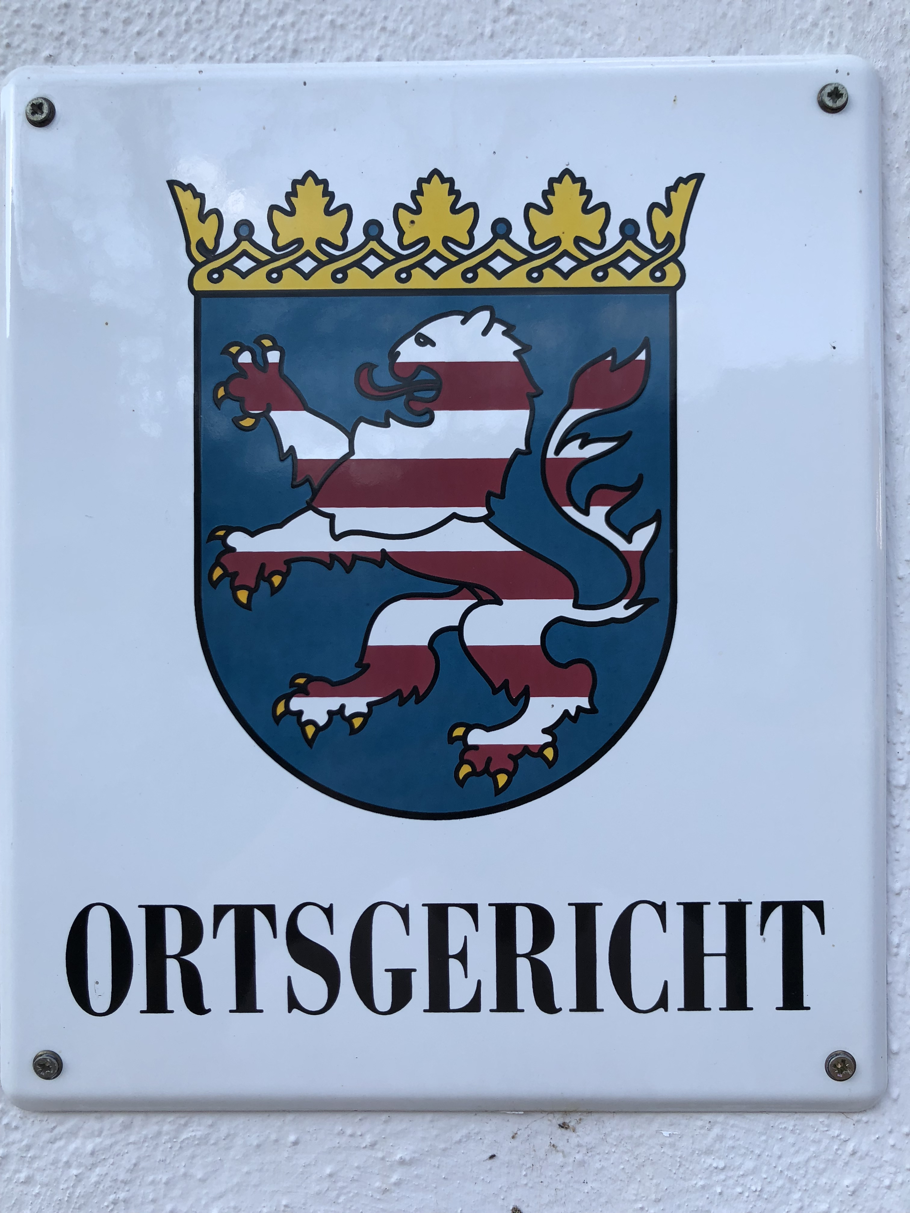 Foto des Dienststellenschilds des Ortsgerichts Trebur I